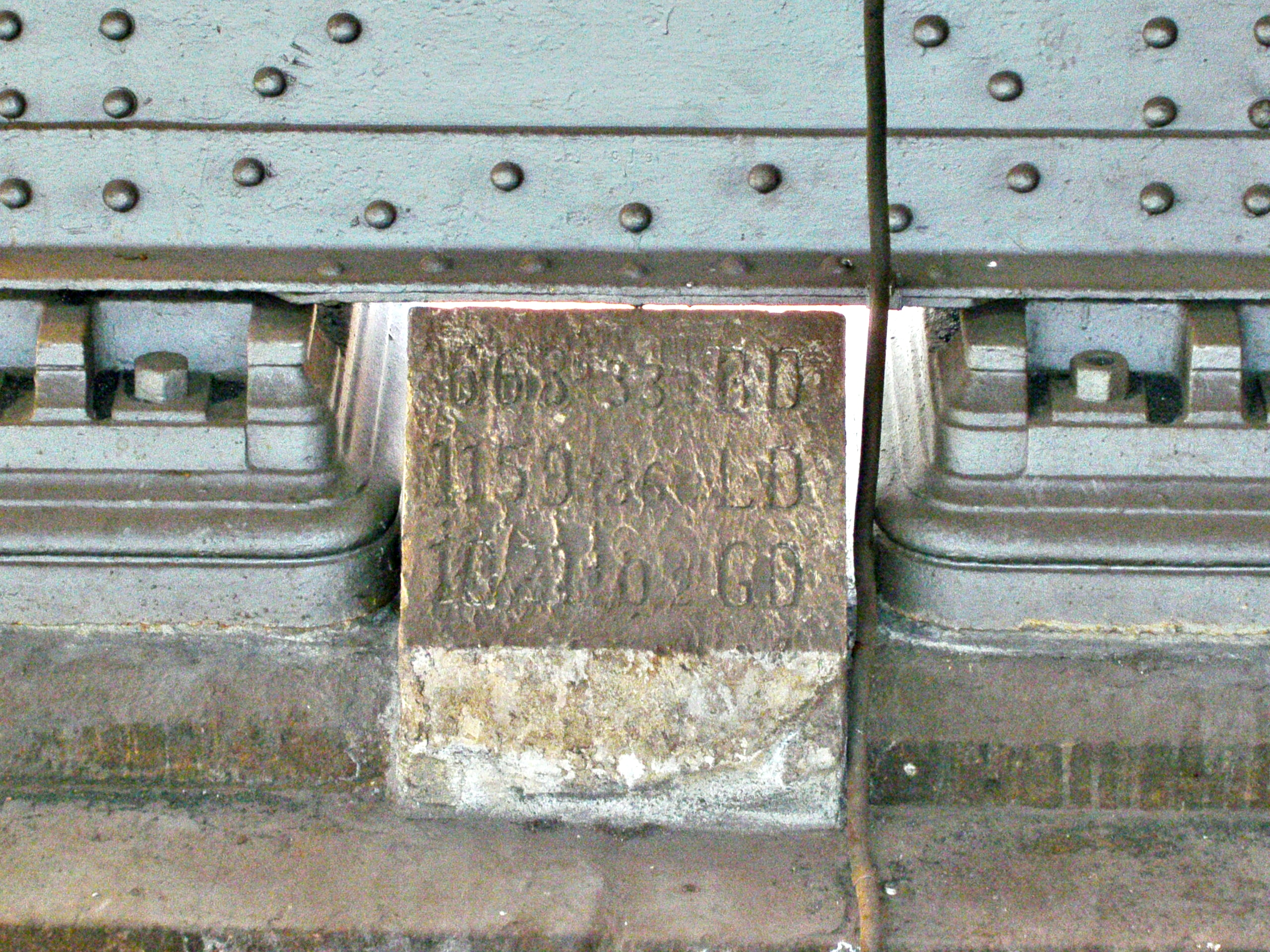 Dreikilometerstein im Bahnhof Dresden-Neustadt, hinter Bahnsteig 8. Er zeigt den gemeinsam Endpunkt der drei hier aufeinander treffenden Eisenbahnstrecken an: BD-Linie km 66,333; LD-Linie km 115,936; GD-Linie km 102,102.